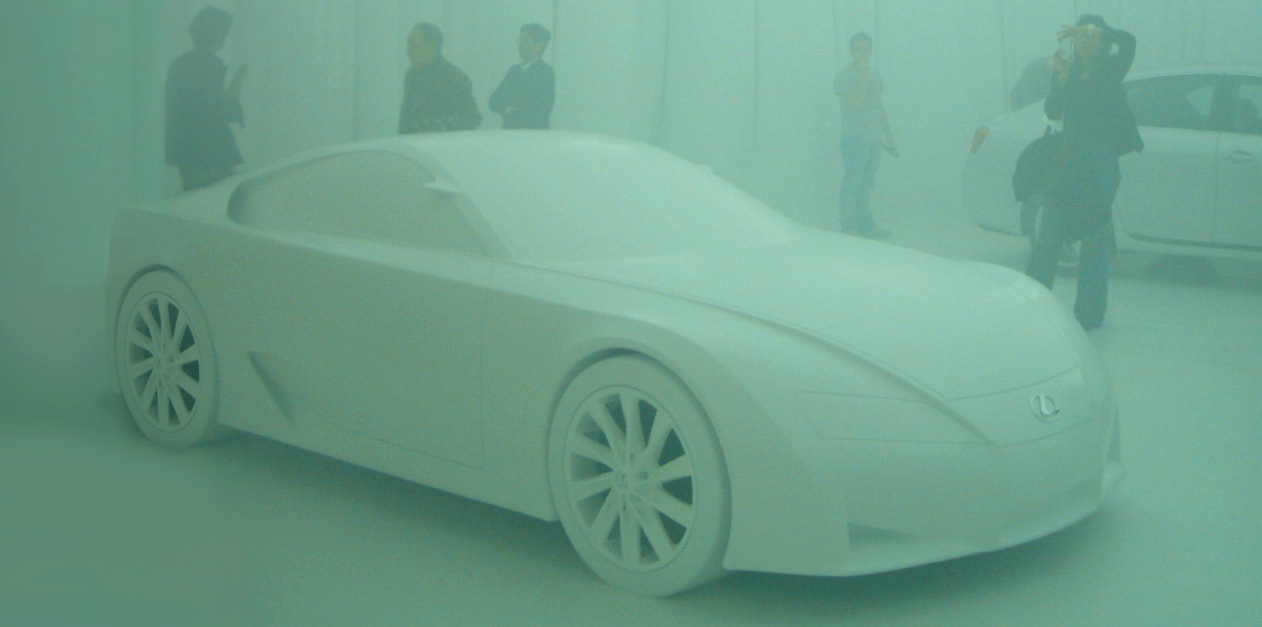 Lexus L-finesse exhibition 2005